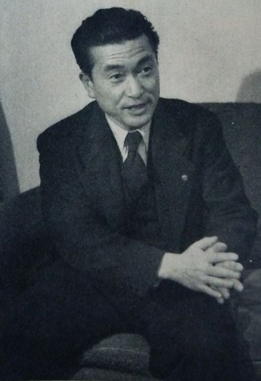 滝田実（全国繊維産業労働組合同盟会長、全日本労働組合会議初代議長）